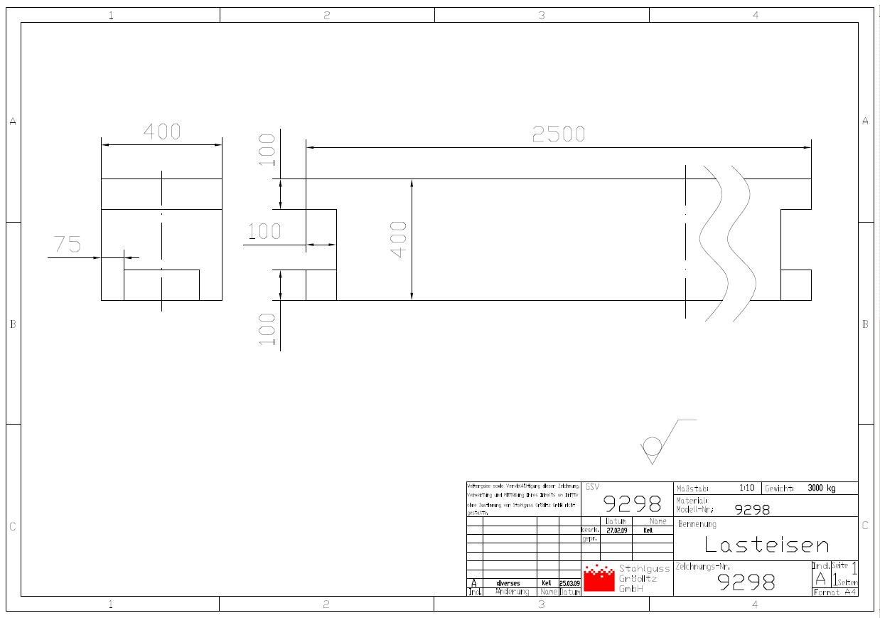 Zeichnung Lasteisen